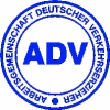 Logo der ADV e.V.